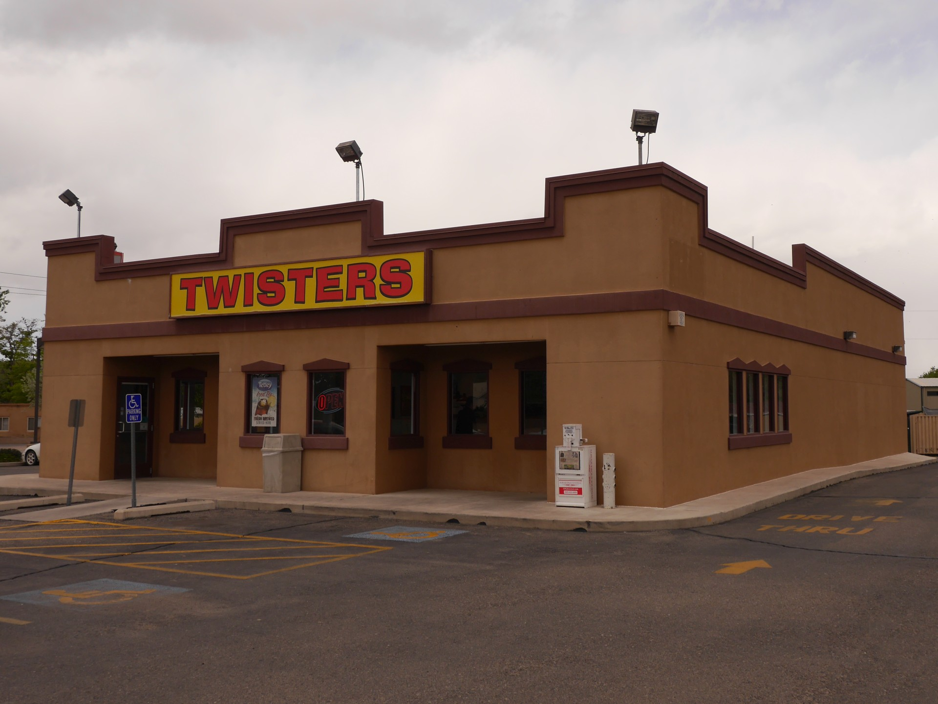 Mehr auf